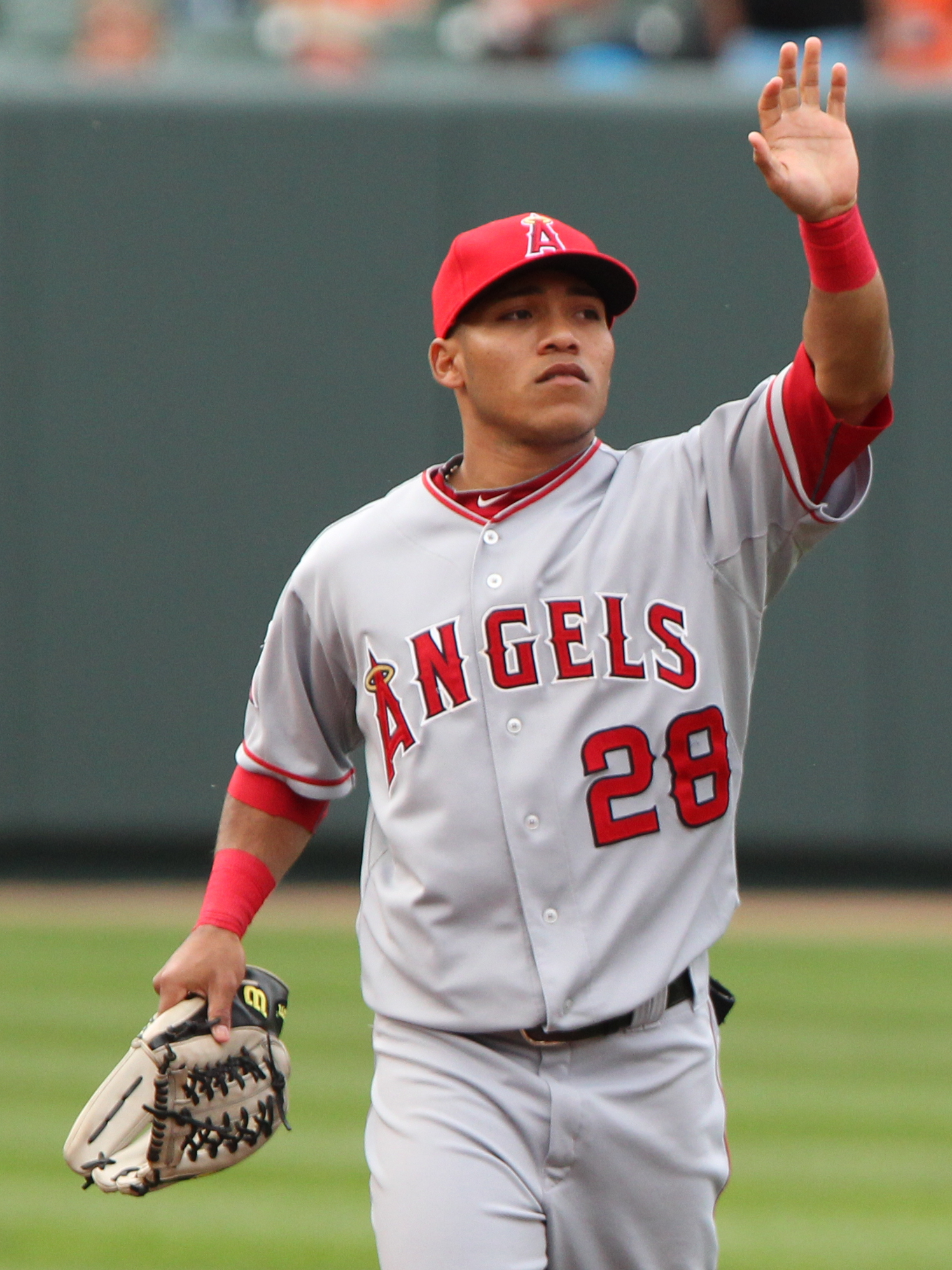 Alexi Amarista